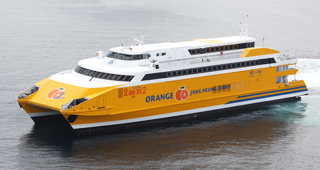 장흥해운과 노력항이 함께 운항하는 오렌지호 중 2호.